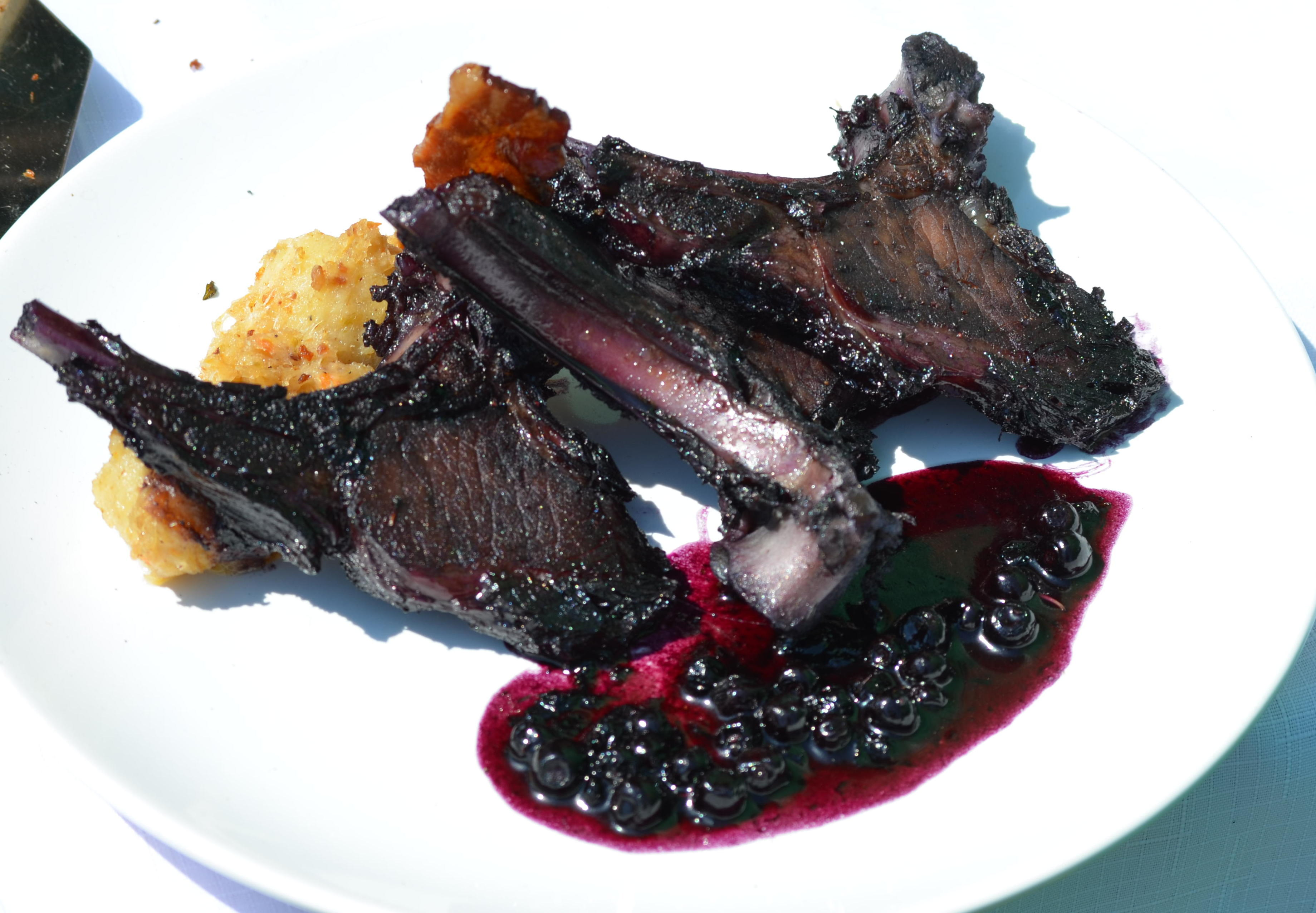 Wildschweinkarree mit Blaubeeren-Sauce aus Bieszczady